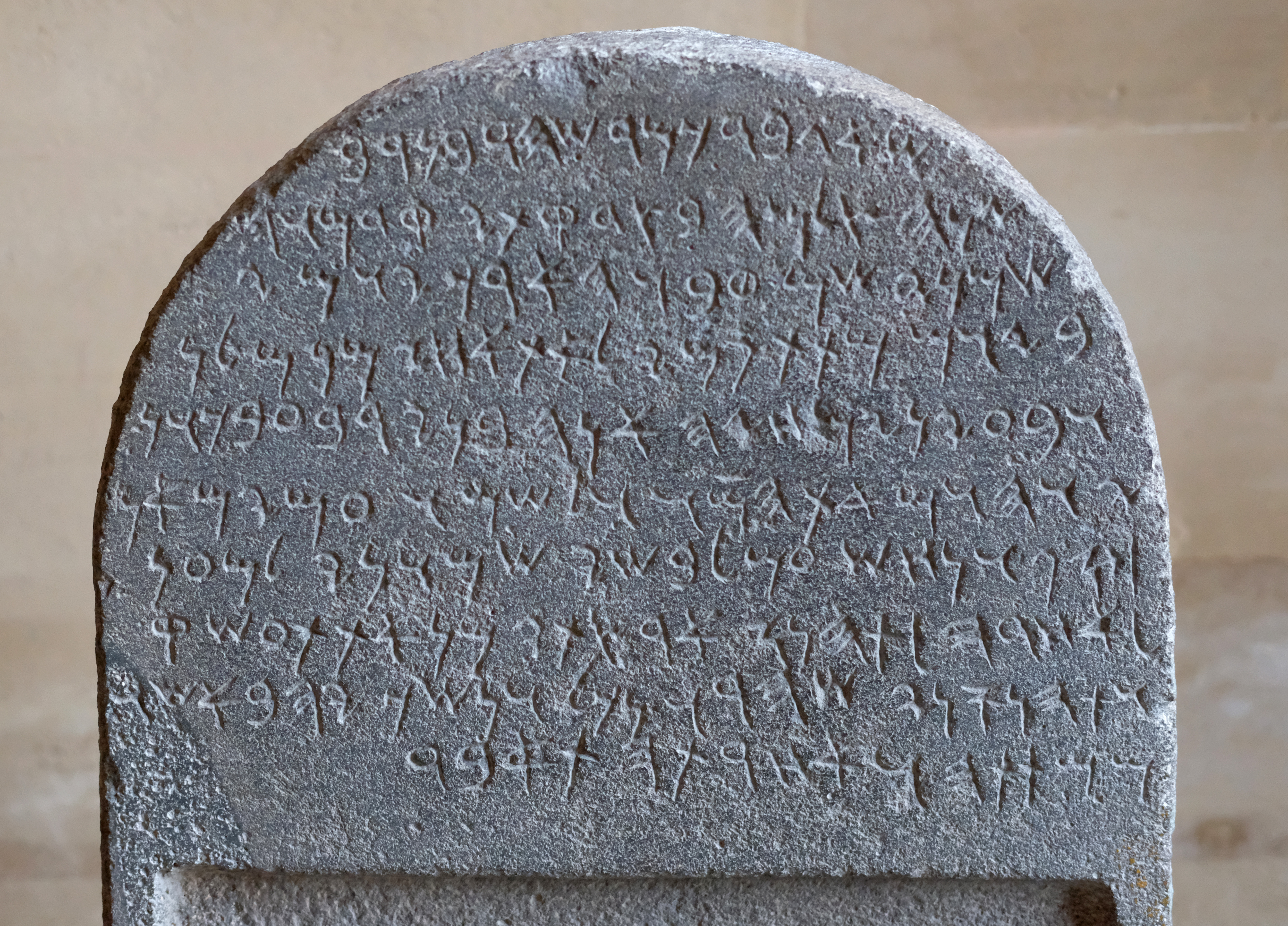 Cette stèle funéraire présente un décor sculpté et une inscription en araméen. Le décor montre le prêtre Si`gabbor banquetant devant une table d'offrande.